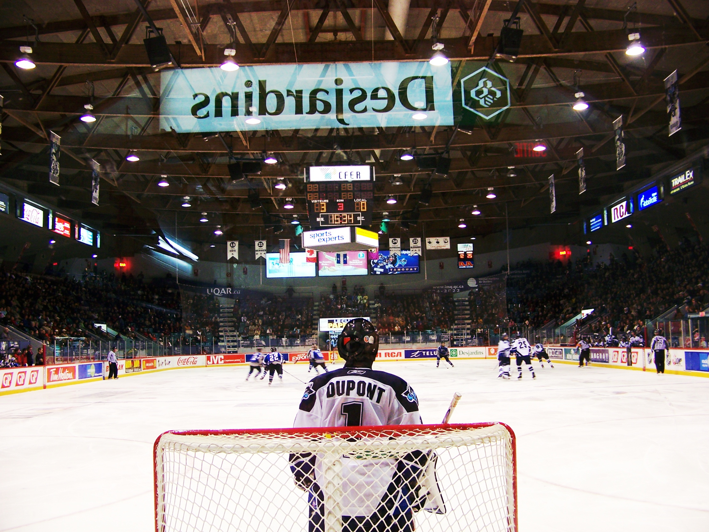 Keven Dupont et l'Océanic de Rimouski au Colisée